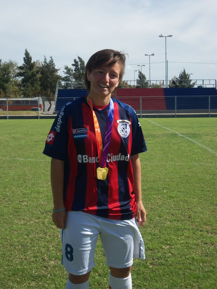 Noelia Espíndola, en la ciudad deportiva de San Lorenzo, mostrando la medalla de oro obtenida en los juegos Odesur 2014 con la selección argentina.